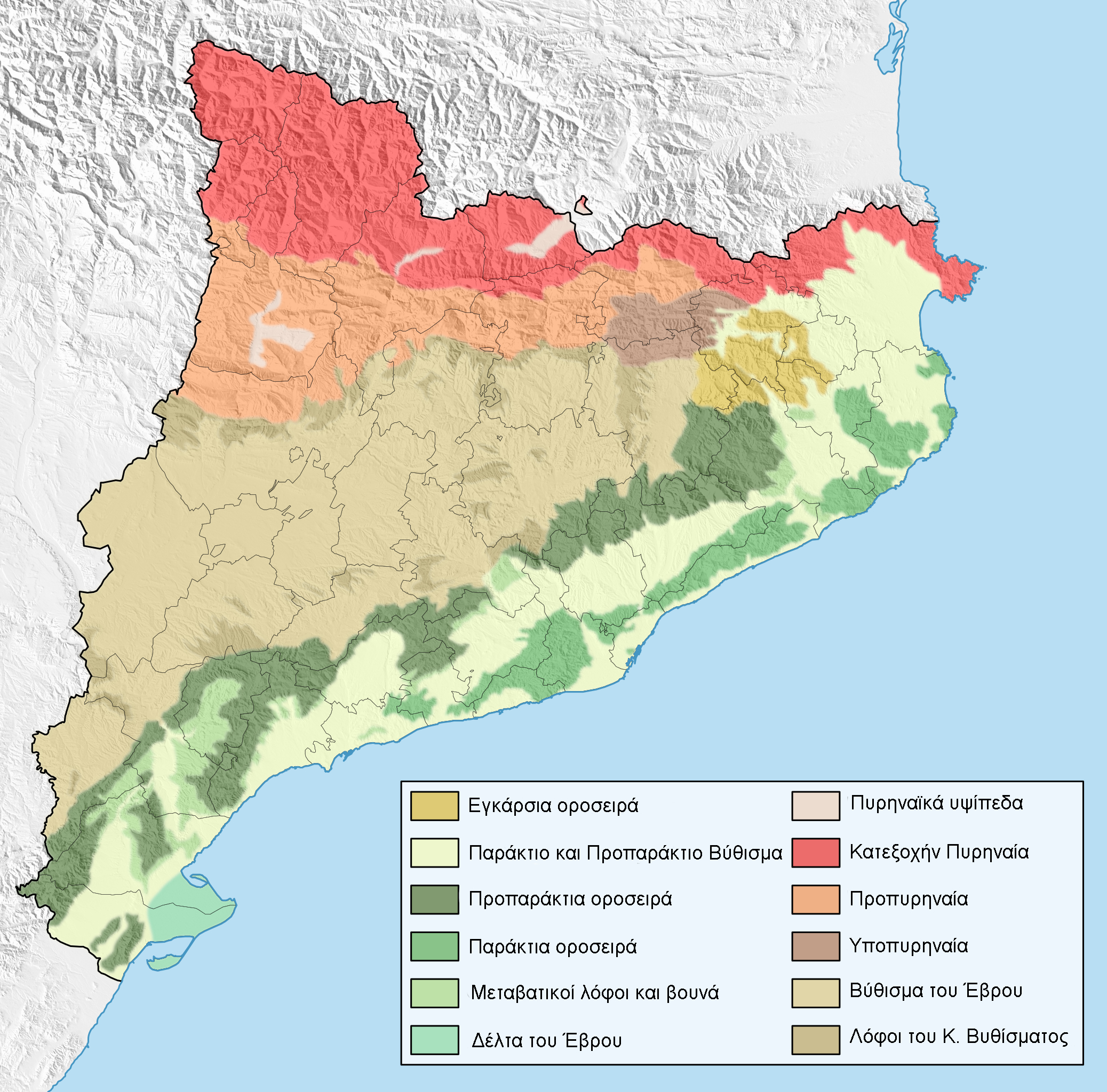 Το γεωγραφικό ανάγλυφο της Καταλονίας με τις κύριες ενότητες χωρίς ποταμούς ή υψόμετρο.